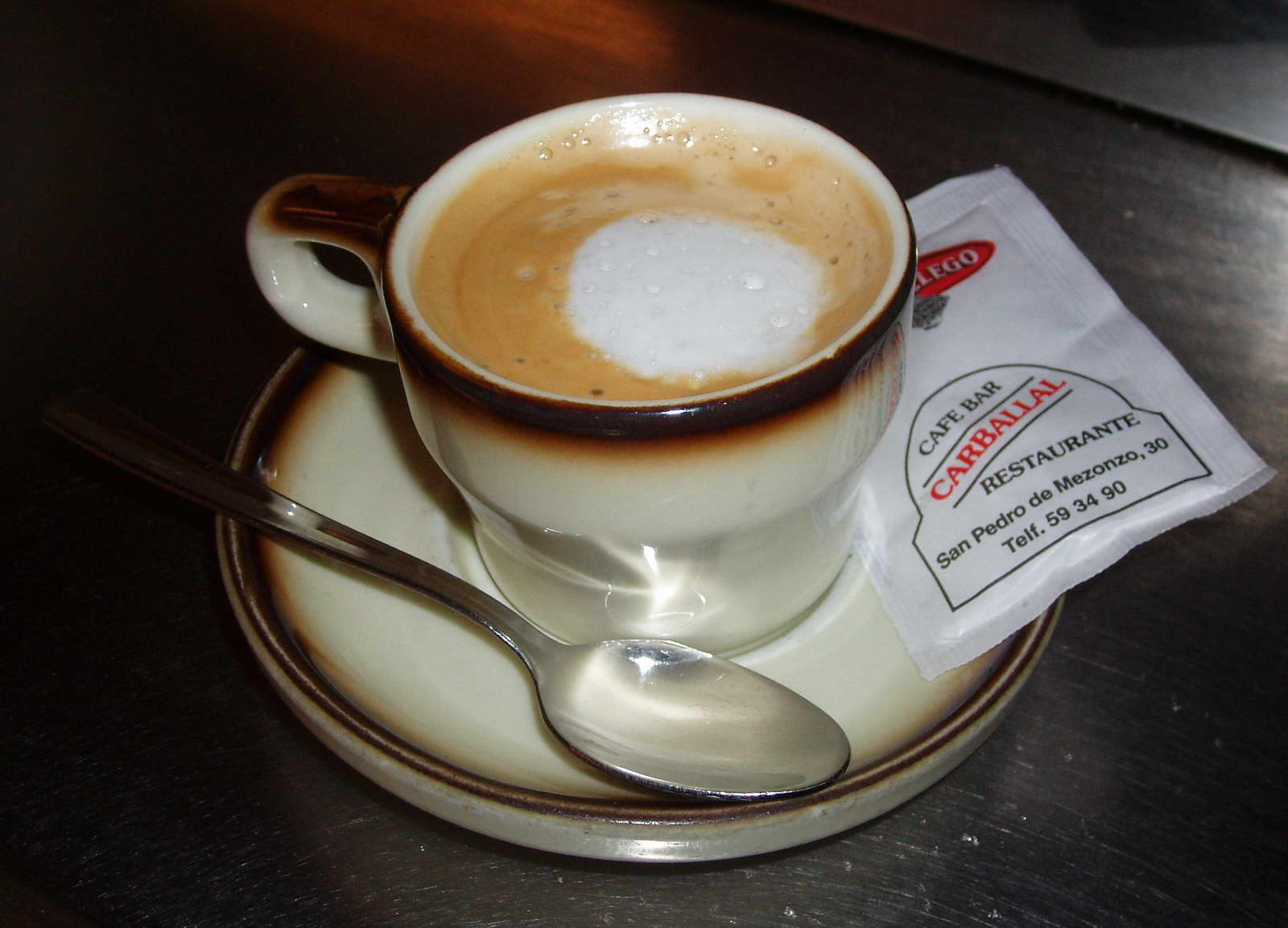 self made. Cafe